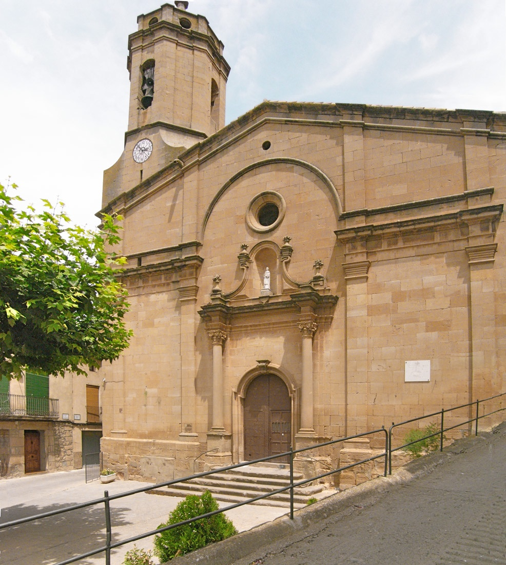 Església del Soleràs